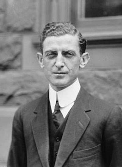 Srpski (latinica): Dr Edvard Rajan (1883-1923)